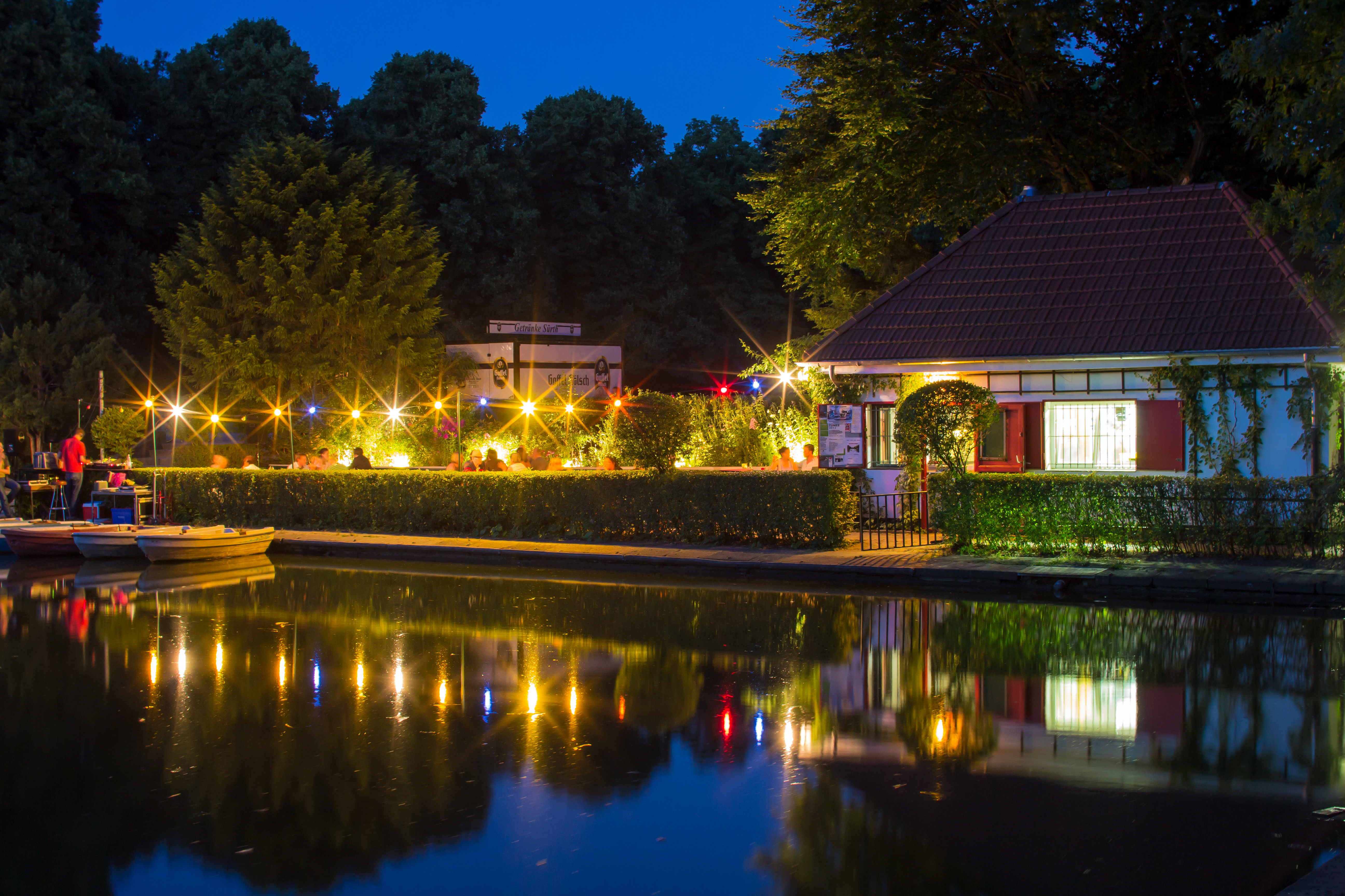 Bootshaus mit Biergarten im Blücherpark, Köln-Bilderstöckchen